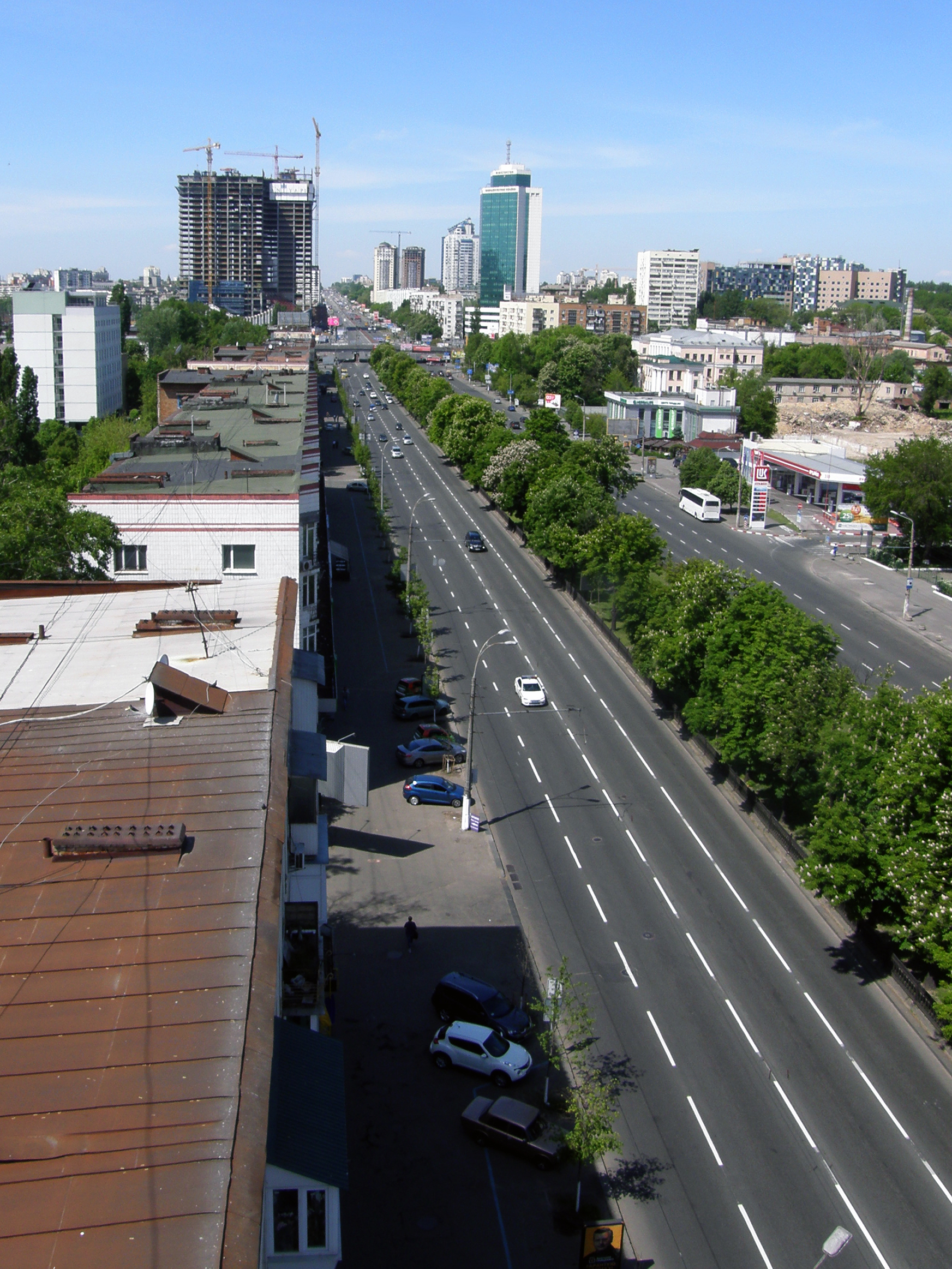 часть проспекта Победы — бывший бульвар Шевченко